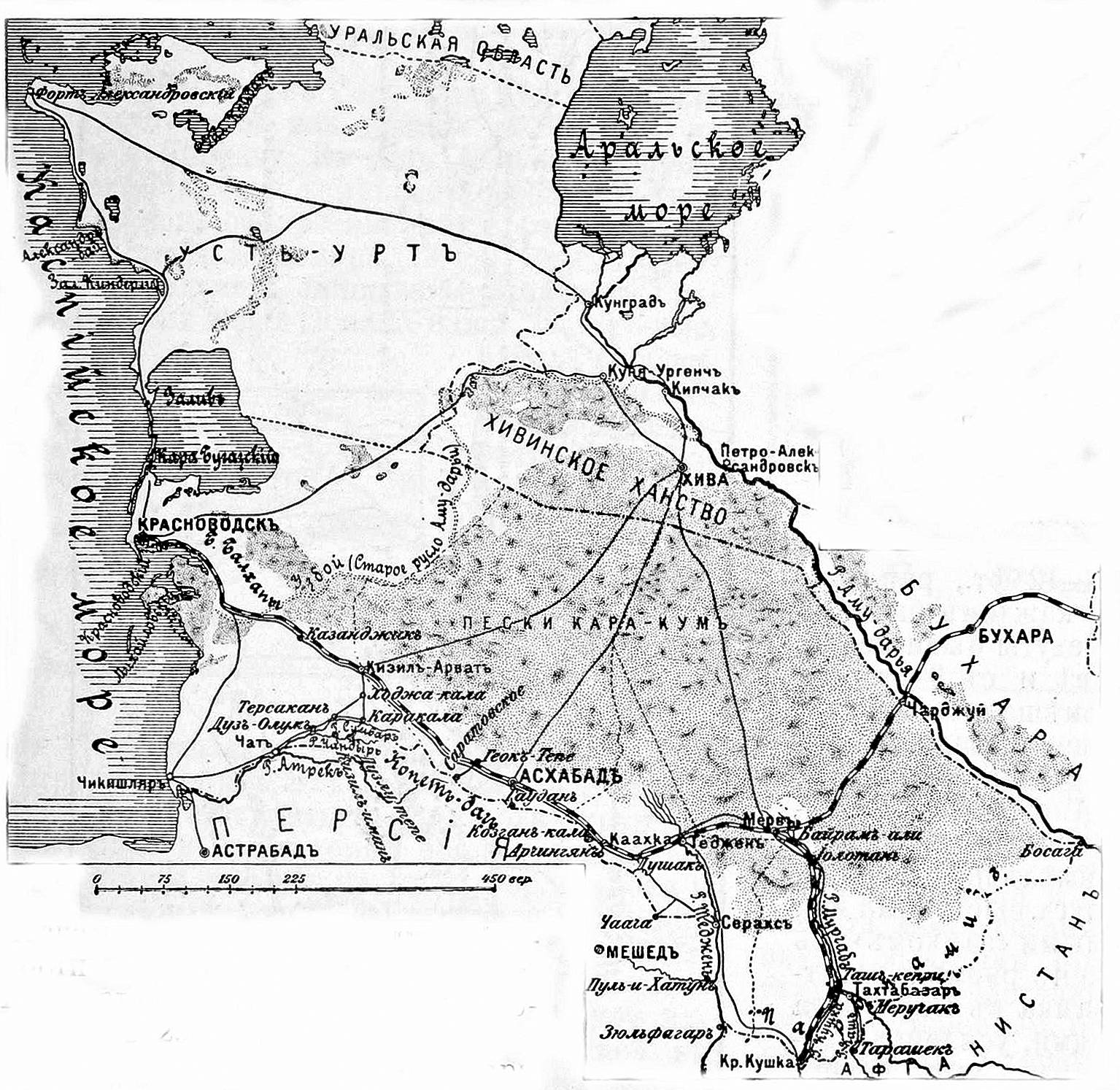 Это изображение было использовано для иллюстрирования статьи «Закаспийская область» опубликованной в десятом томе «Военной энциклопедии», который был издан книгоиздательским товариществом И. Д. Сытина в 1912—1913 гг. в столице Российской империи городе Санкт-Петербурге.